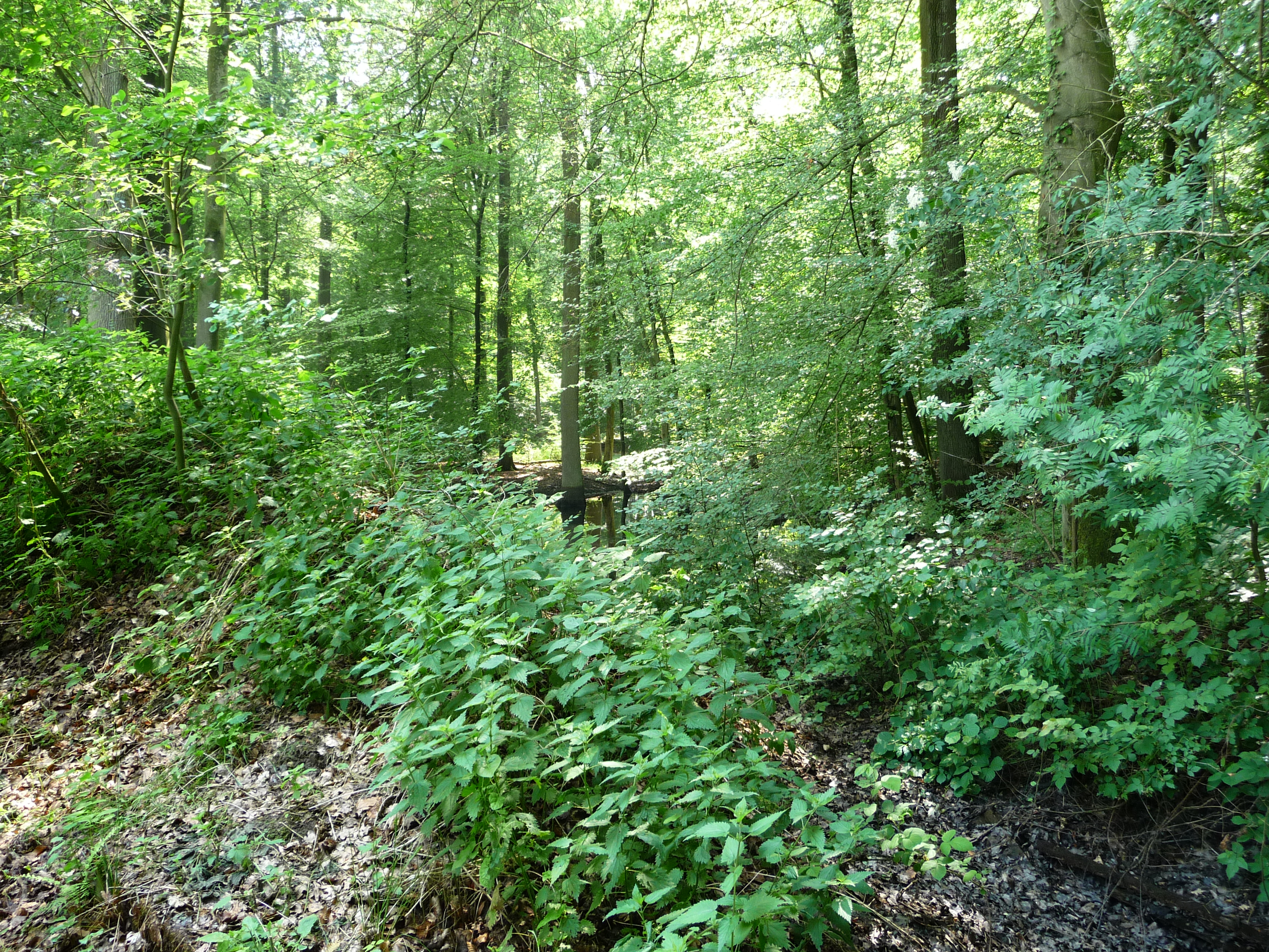 Rund um Gerden / Melle liegen mehrere Waldgebiete. Eine landschaftlich sehr reizvolle Gegend mit Teichen, Bächen, zum Teil direkt im Wald.